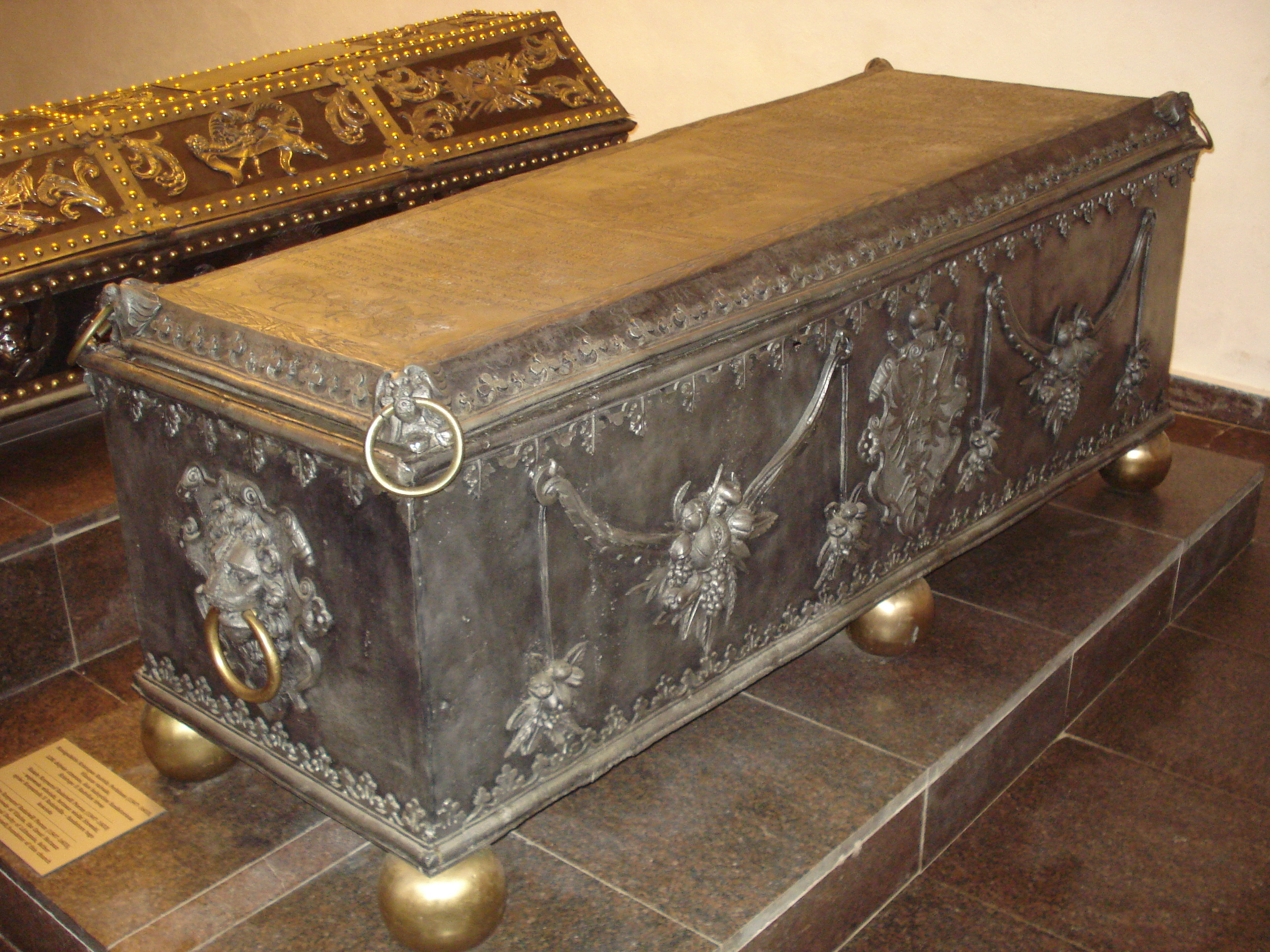 Kunigaikščio Kristupo Perkūno Radvilos (1547–1603) sarkofagas Evangelikų reformatų bažnyčios kriptoje Kėdainiuse